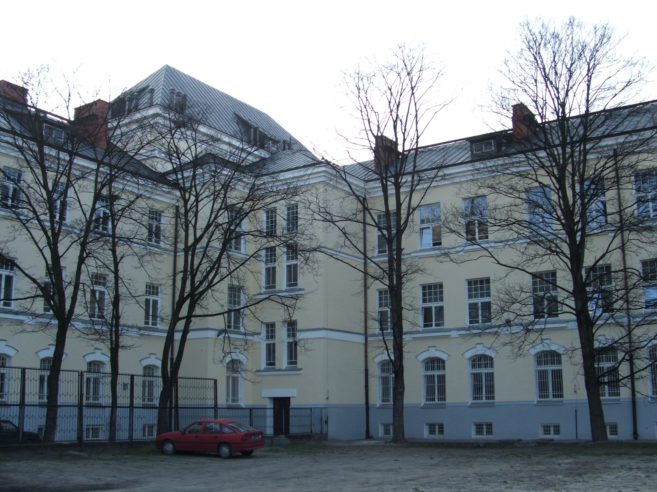 Budynek Liceum od strony podwórza